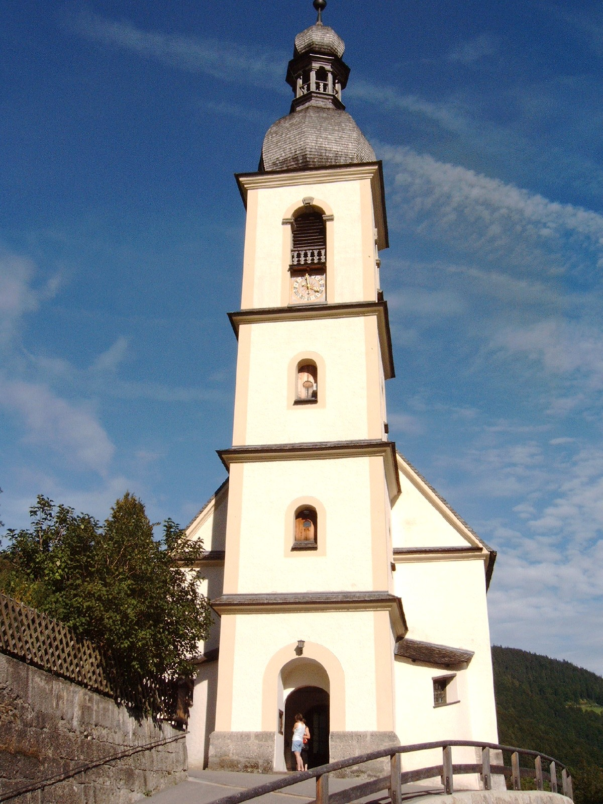 Kapelle in Ramsau/Berchtesgaden